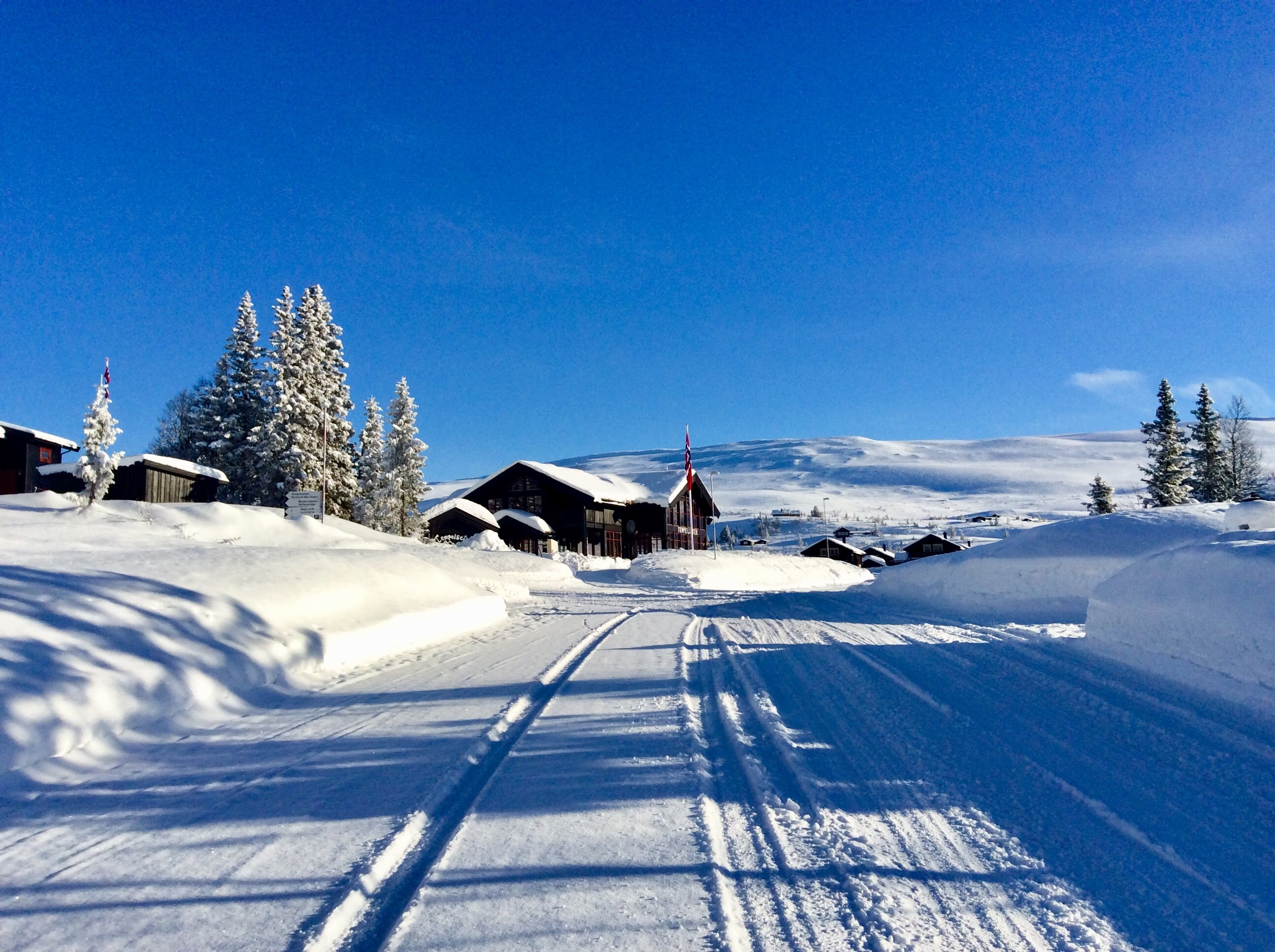 935 moh